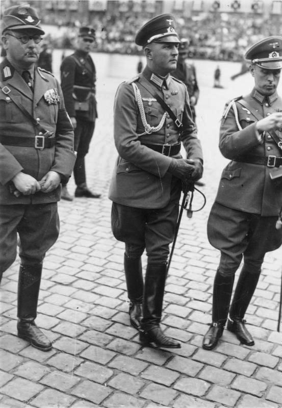 Major Friedrich Hossbach (Mitte), der Adjudant des Führers (Aufnahme: 1934) 34725-34